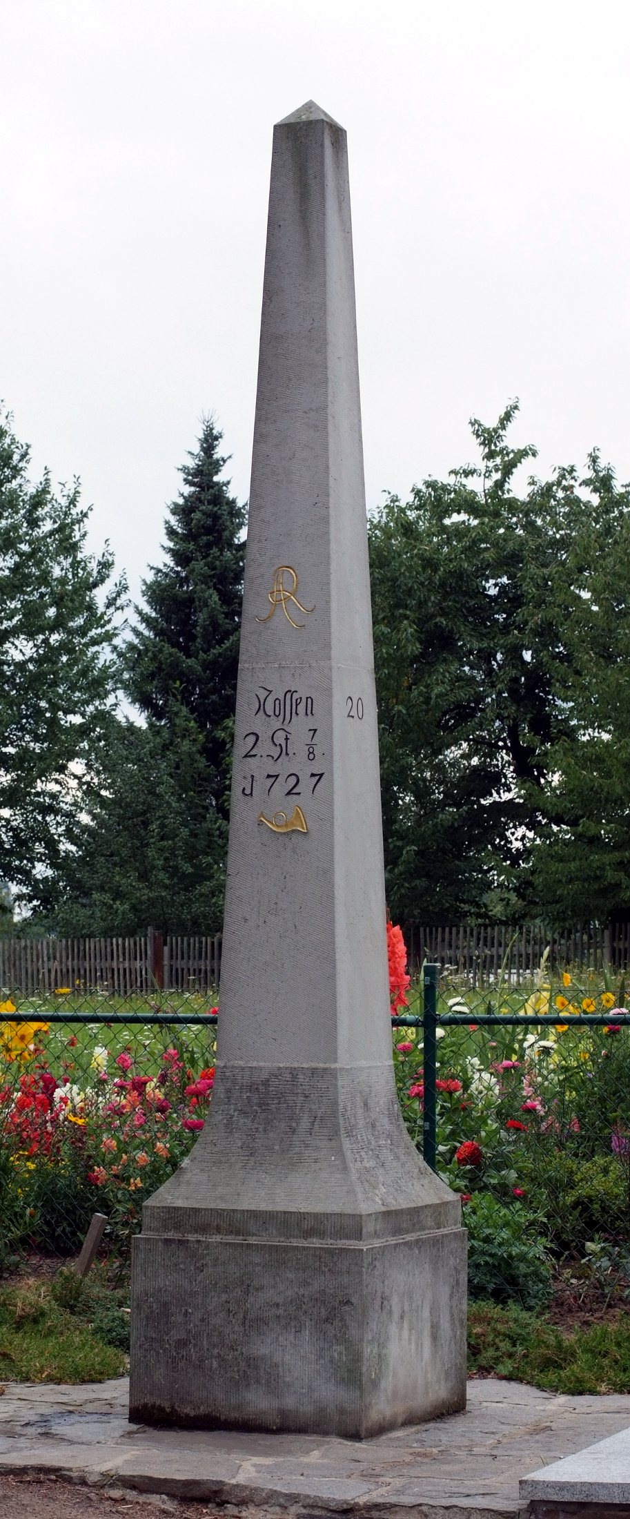 kursächsische Ganzmeilensäule in Pappendorf